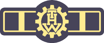 Dienststellungskennzeichen eines THW-Ortsbeauftragten